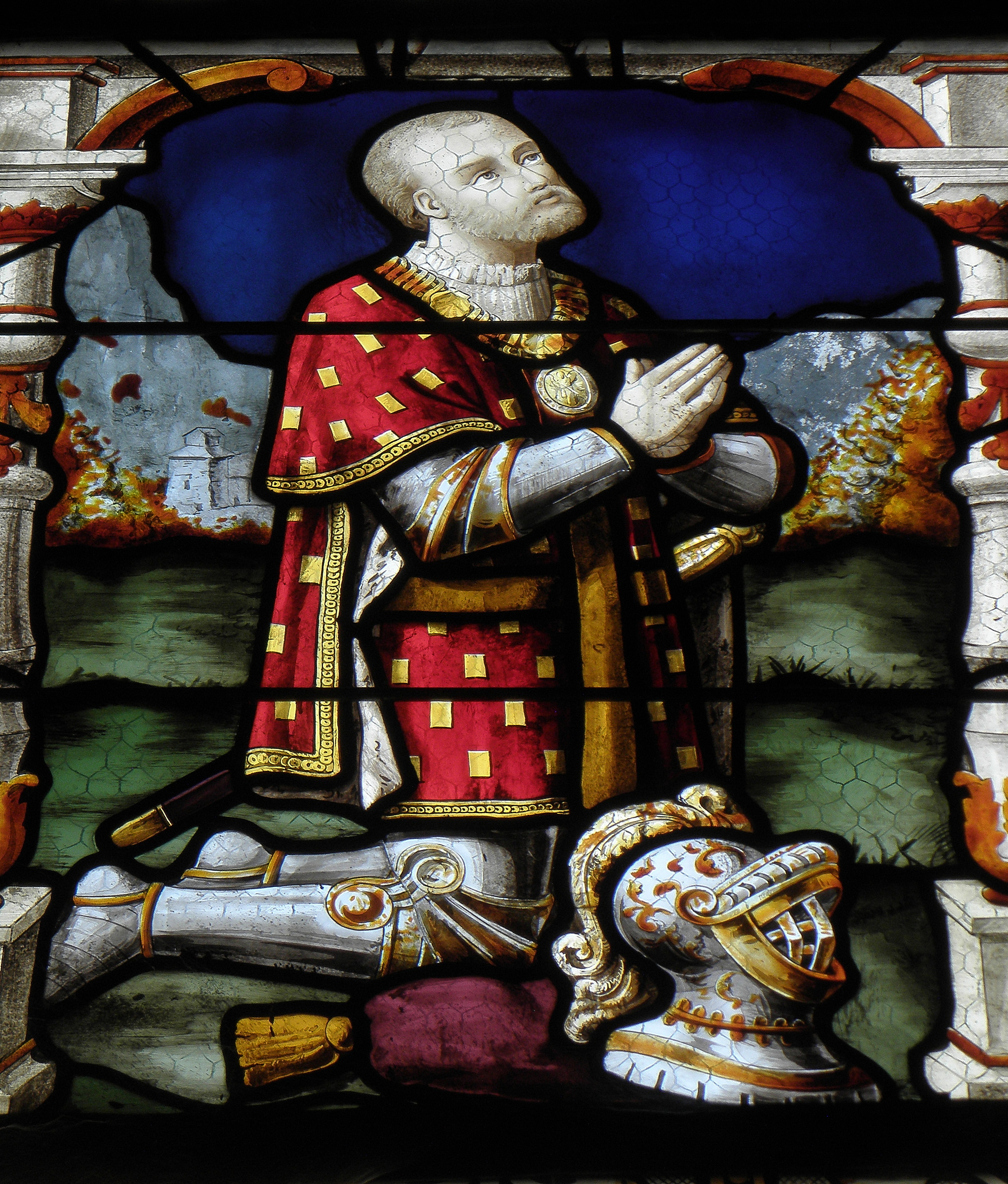 Jacques de Champégné, seigneur de la Montagne. Lancette gauche de la baie 2 de l'église Saint-Pierre de Visseiche (35).